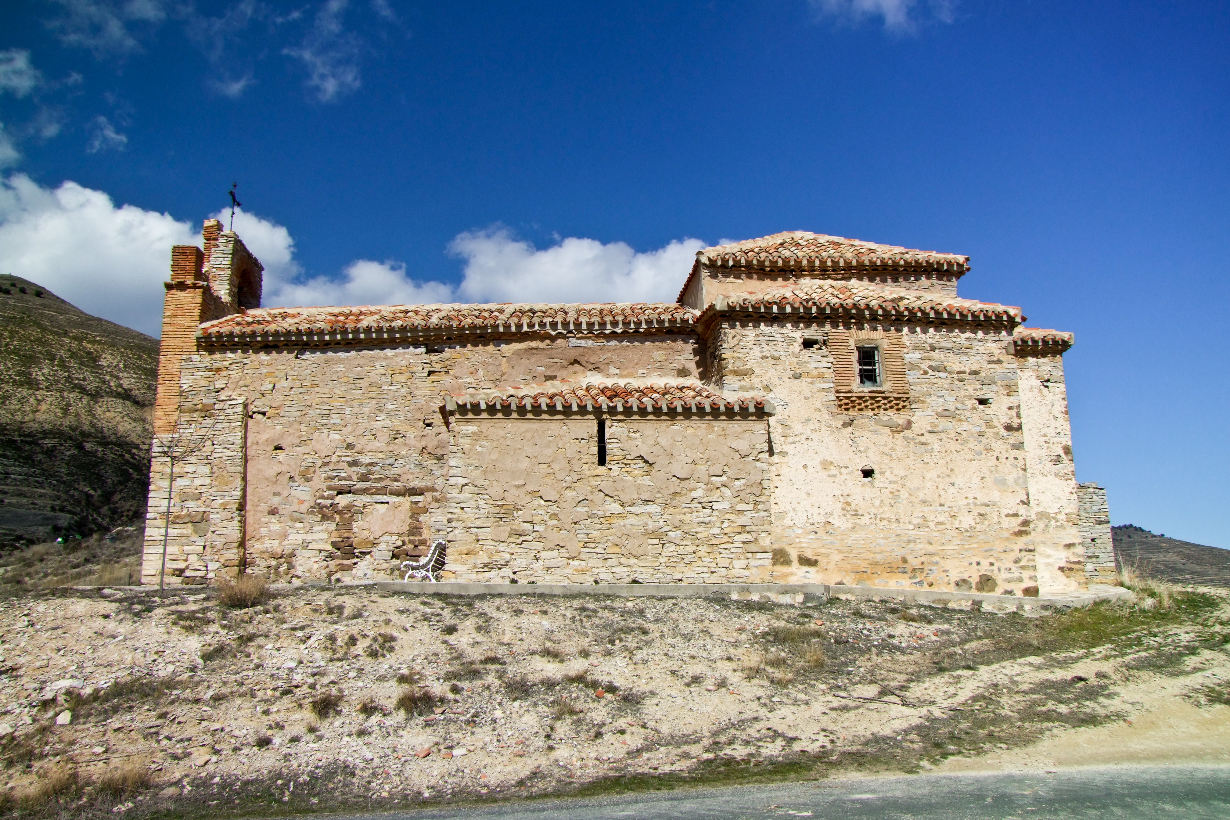 Ermita de Atisca en la localidad de Navajun, La Rioja - España